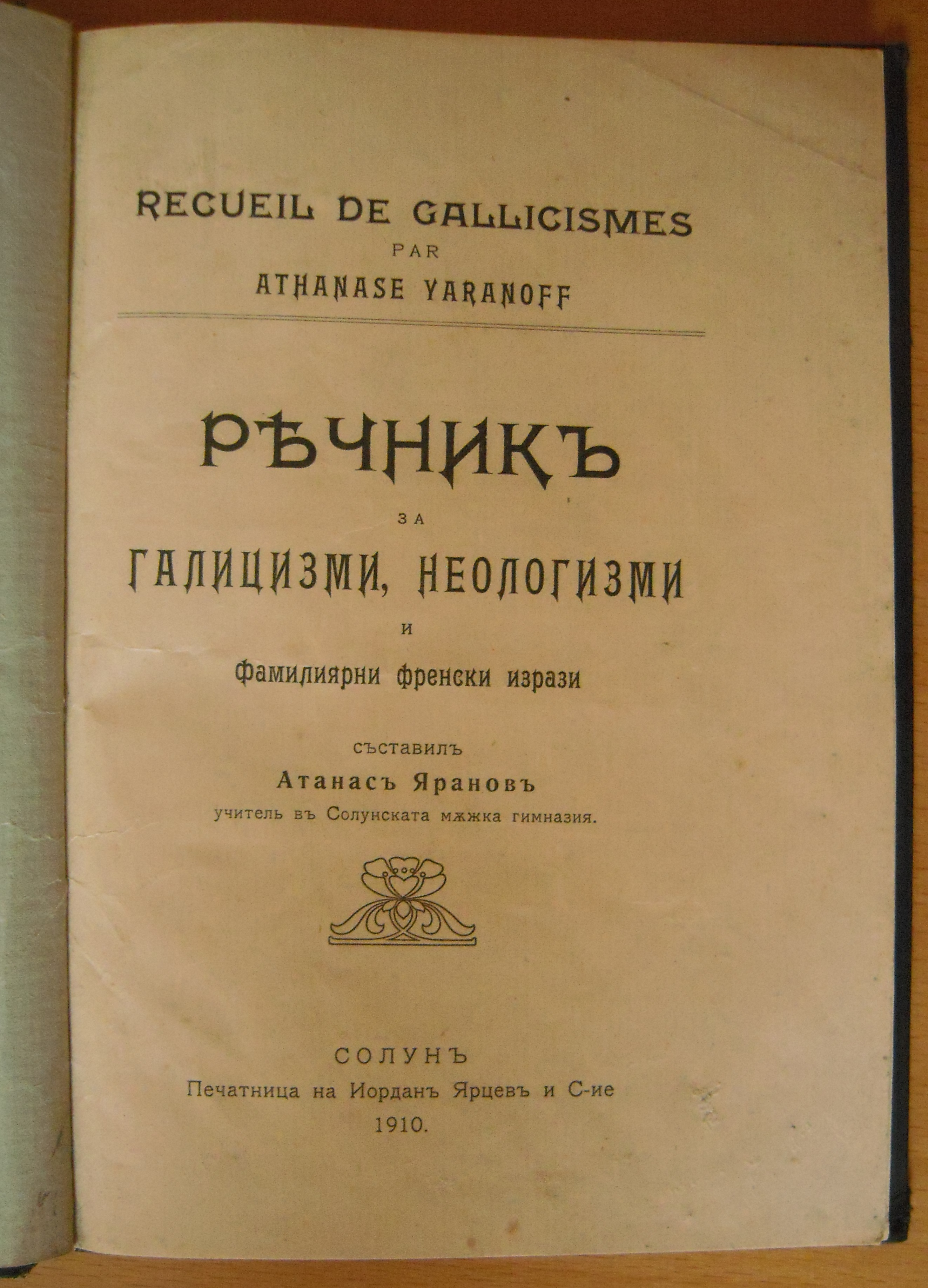 Речник за галицизми, неологизми и фамилиарни френски изрази, Солун, 1910